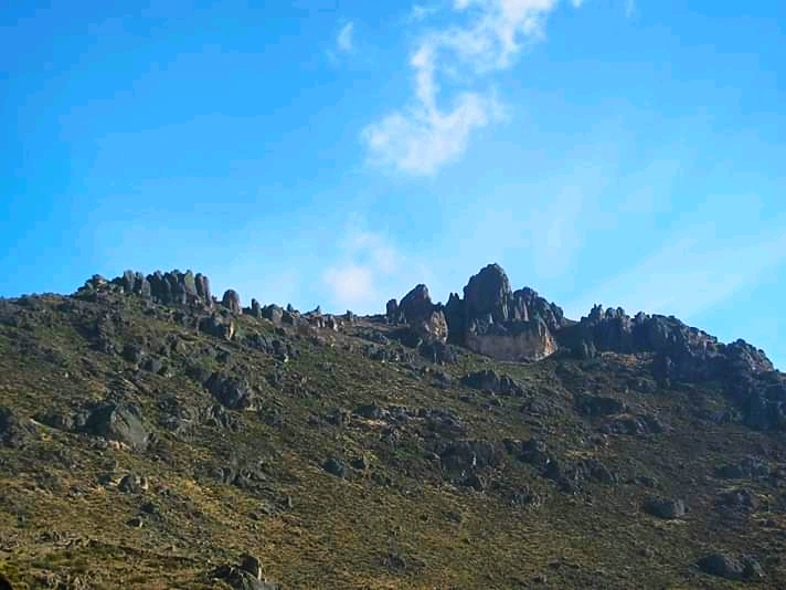 cerro de Canchón en Pampas Grande